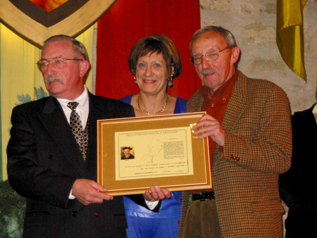 Guy Thomas à droite - parolier et poete, lors de sa remise du Prix littéraire Marcel Grancher